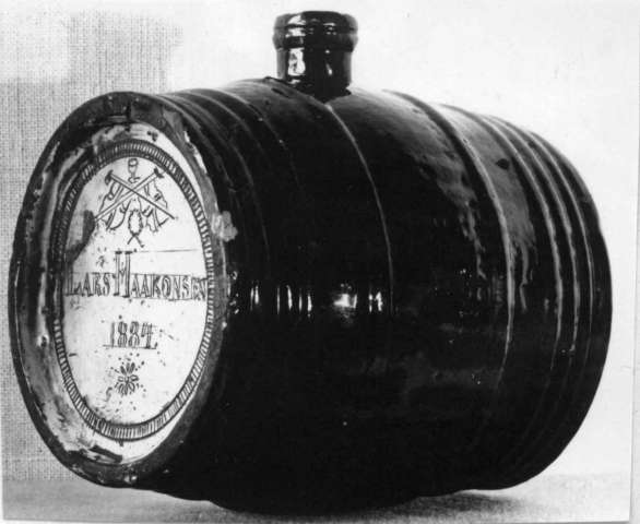 Brennevinskagge i keramikk datert 1884 og laget av Andreas Løkke på Tangens Bruk, Stjørdal i Nord-Trøndelag. Innskrift: Lars Haakonsen. / Der mødtes tre Venner ved Vaterlands Bro. Ola og Ola Olsen og han Jo. Foto Norsk Folkemuseum. NF.1921-1707.